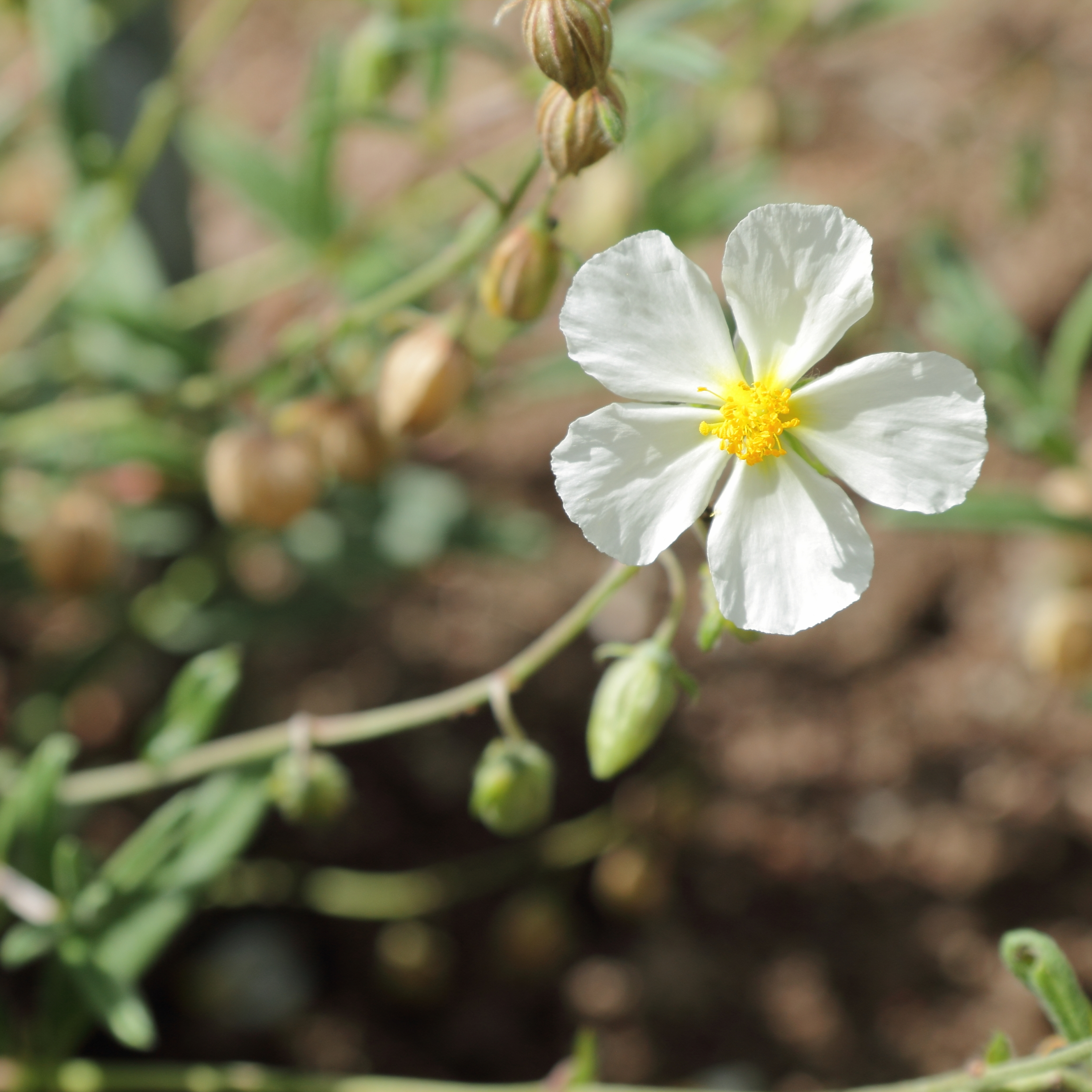 Helianthemum apenninum at Uppsala Botanic Gardens